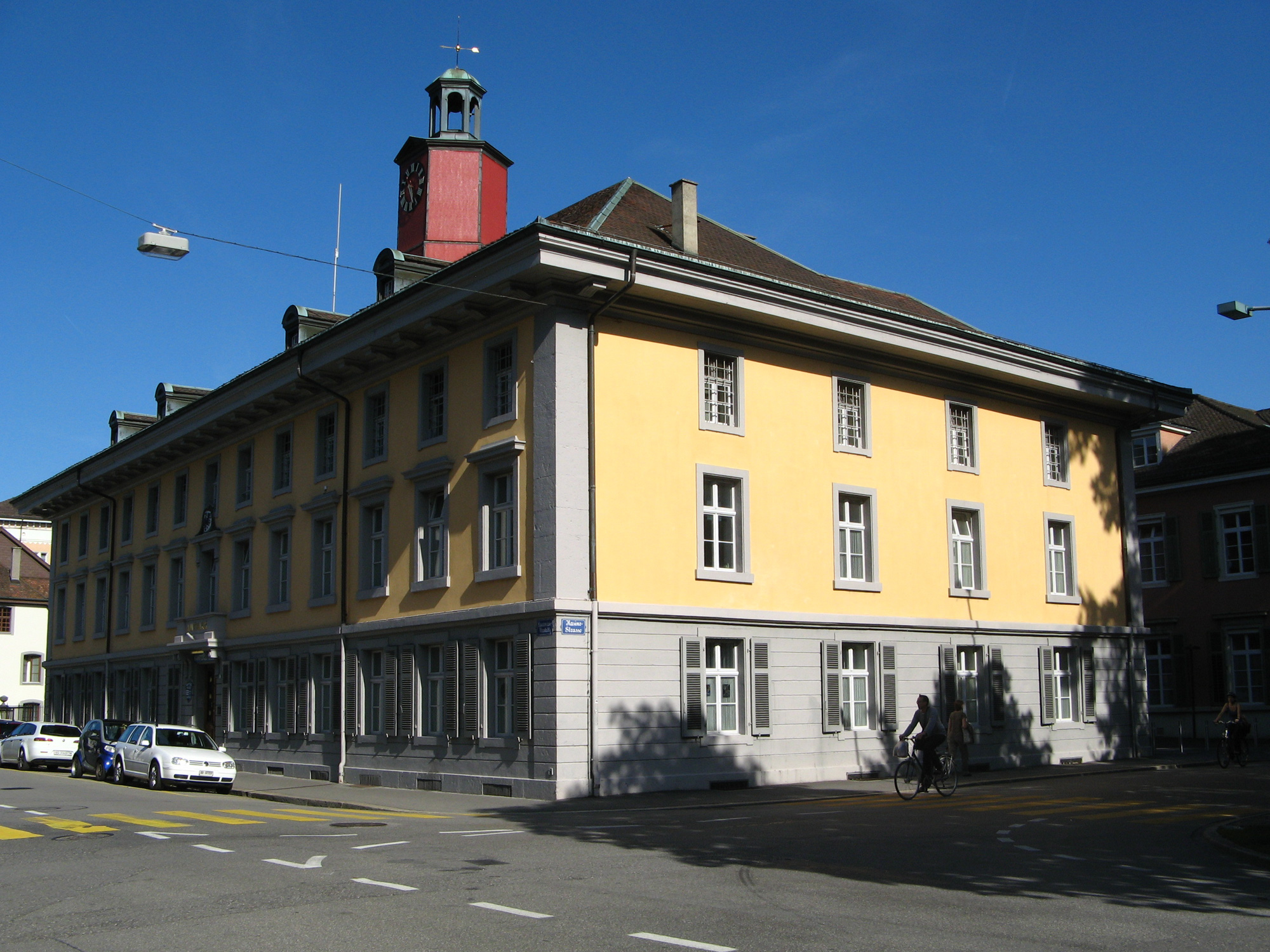 Das Amthaus des Bezirkes Aarau (Laurezenvorstadt 12)